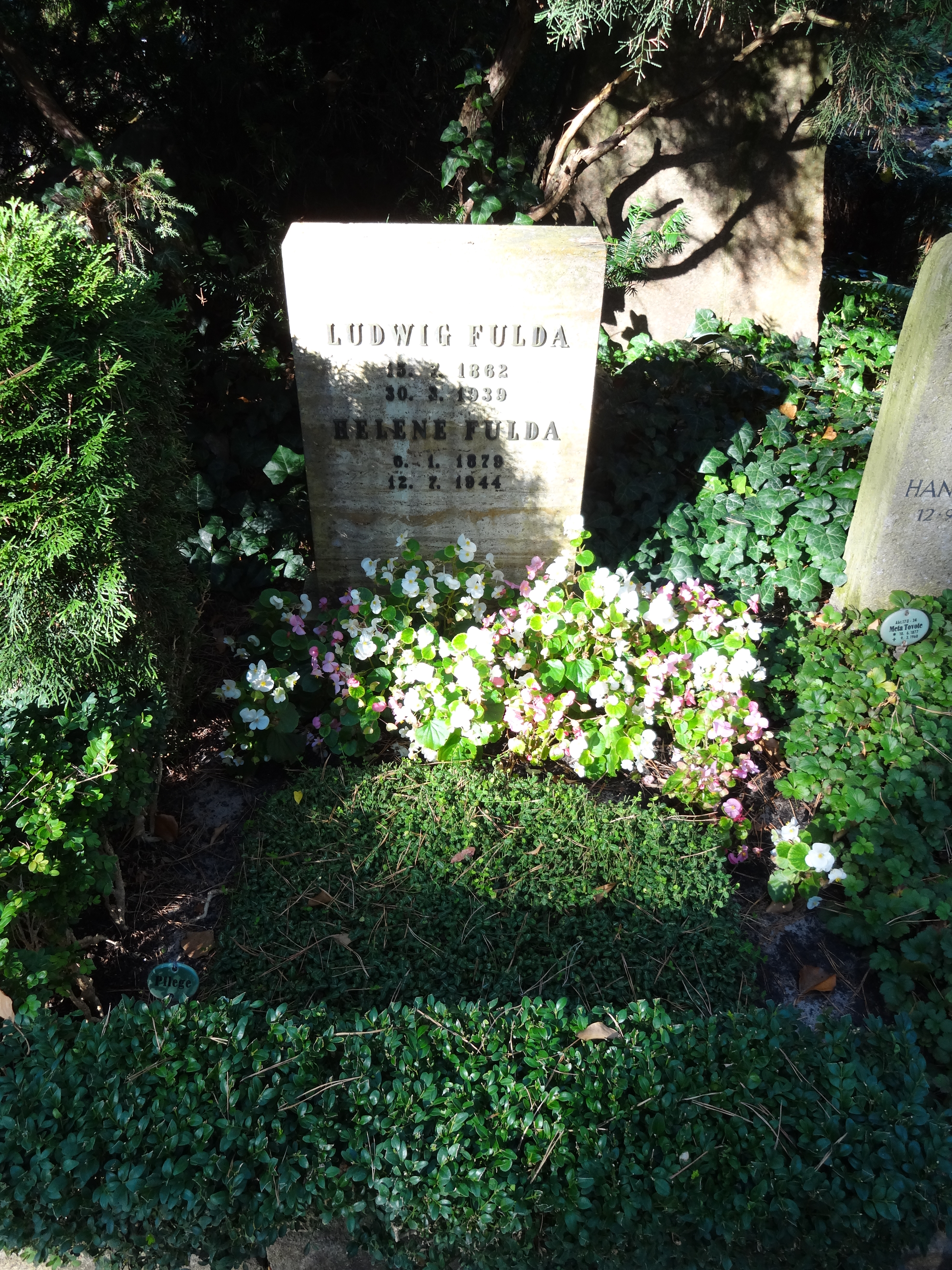 Ehrengrab für Fulda, Ludwig auf dem Waldfriedhof Dahlem; der Friedhof ist ein Gartendenkmal in Berlin; noch ohne EhrengrabplaketteThis is a photograph of an architectural monument.